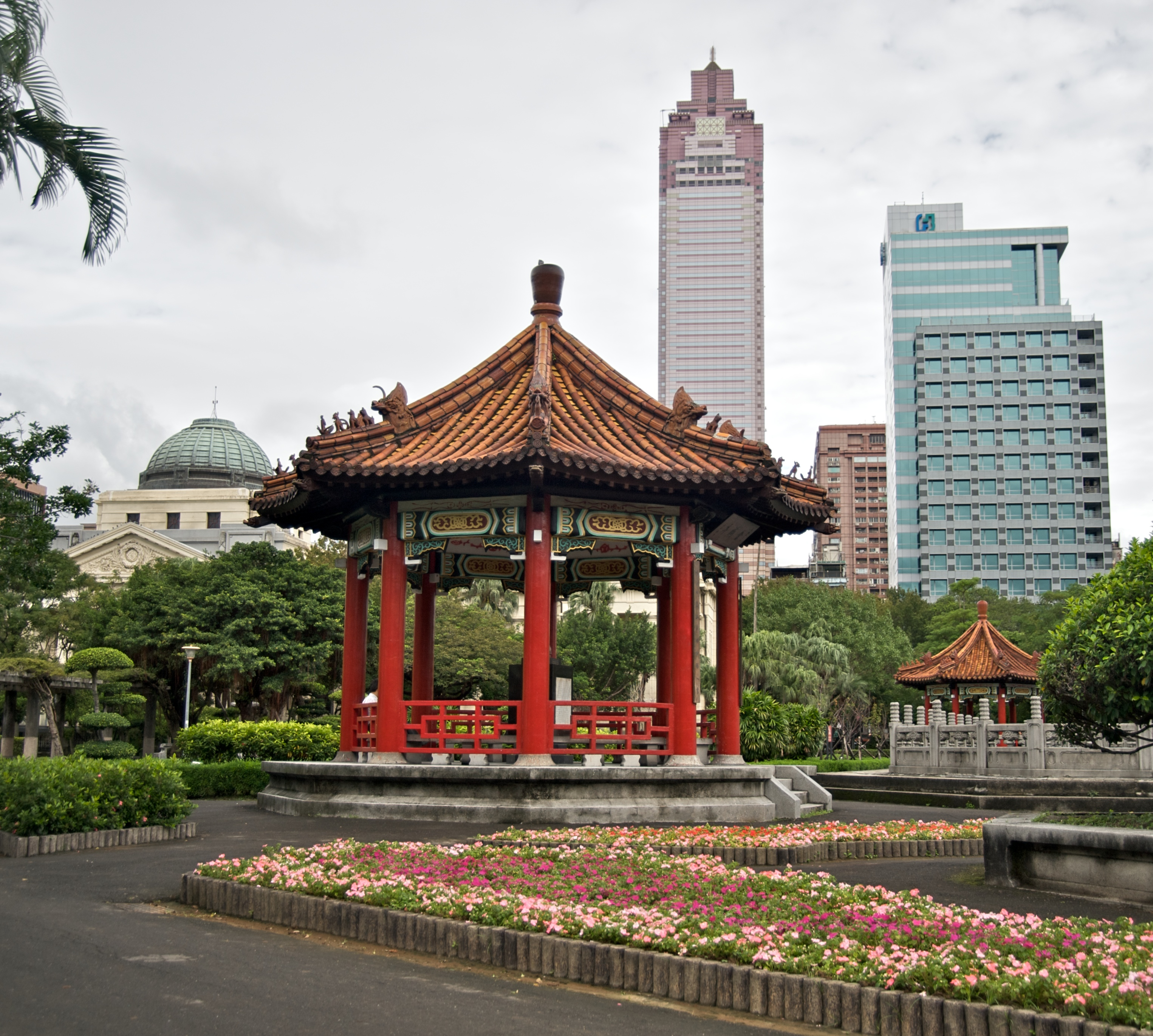 中文（台灣）: 臺北市新公園倉海亭。